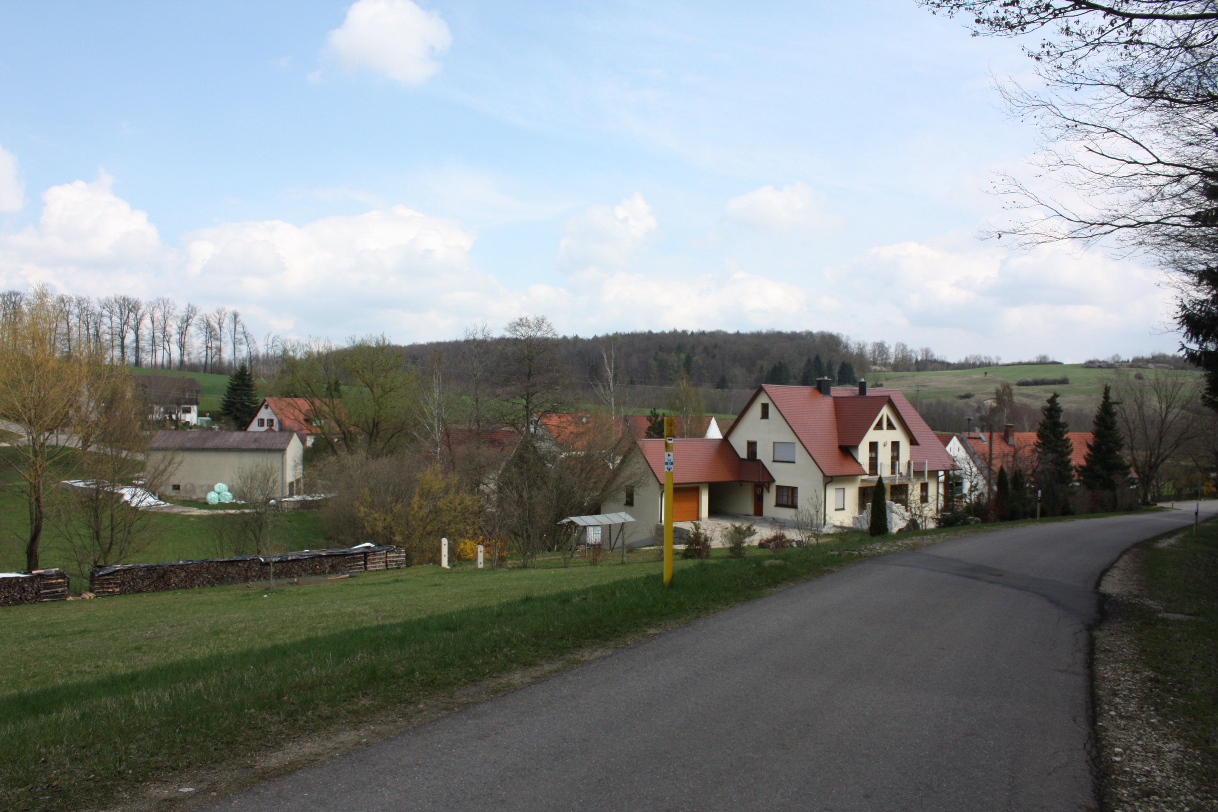 Die Einöde Obere Reismühle gehört zum Stadtteil Mauren in Harburg (Schwaben)